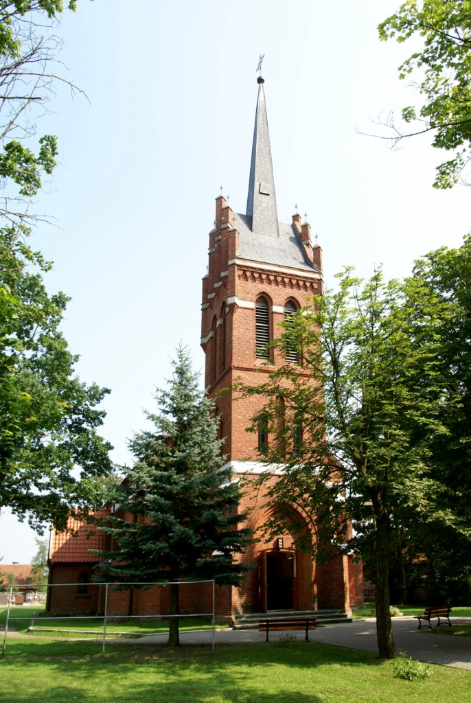 Lipowiec - kościół parafialny p.w. św. Walentego, 1892